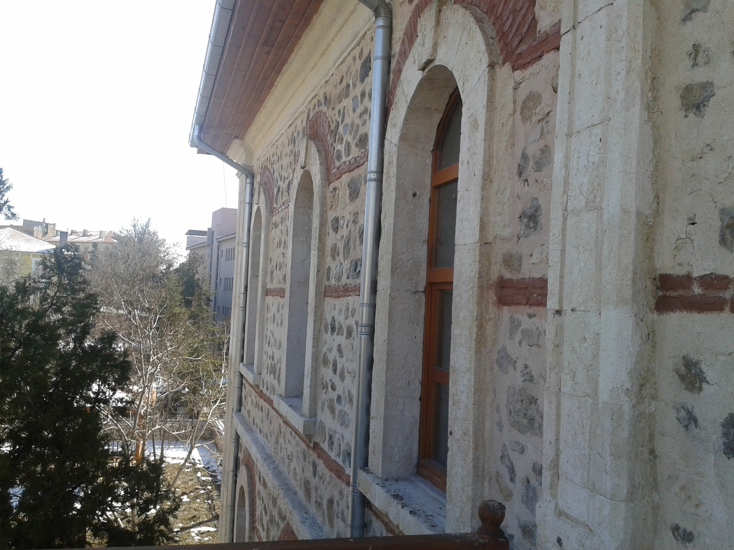 Şereflikoçhisar müzesi çalışmaları